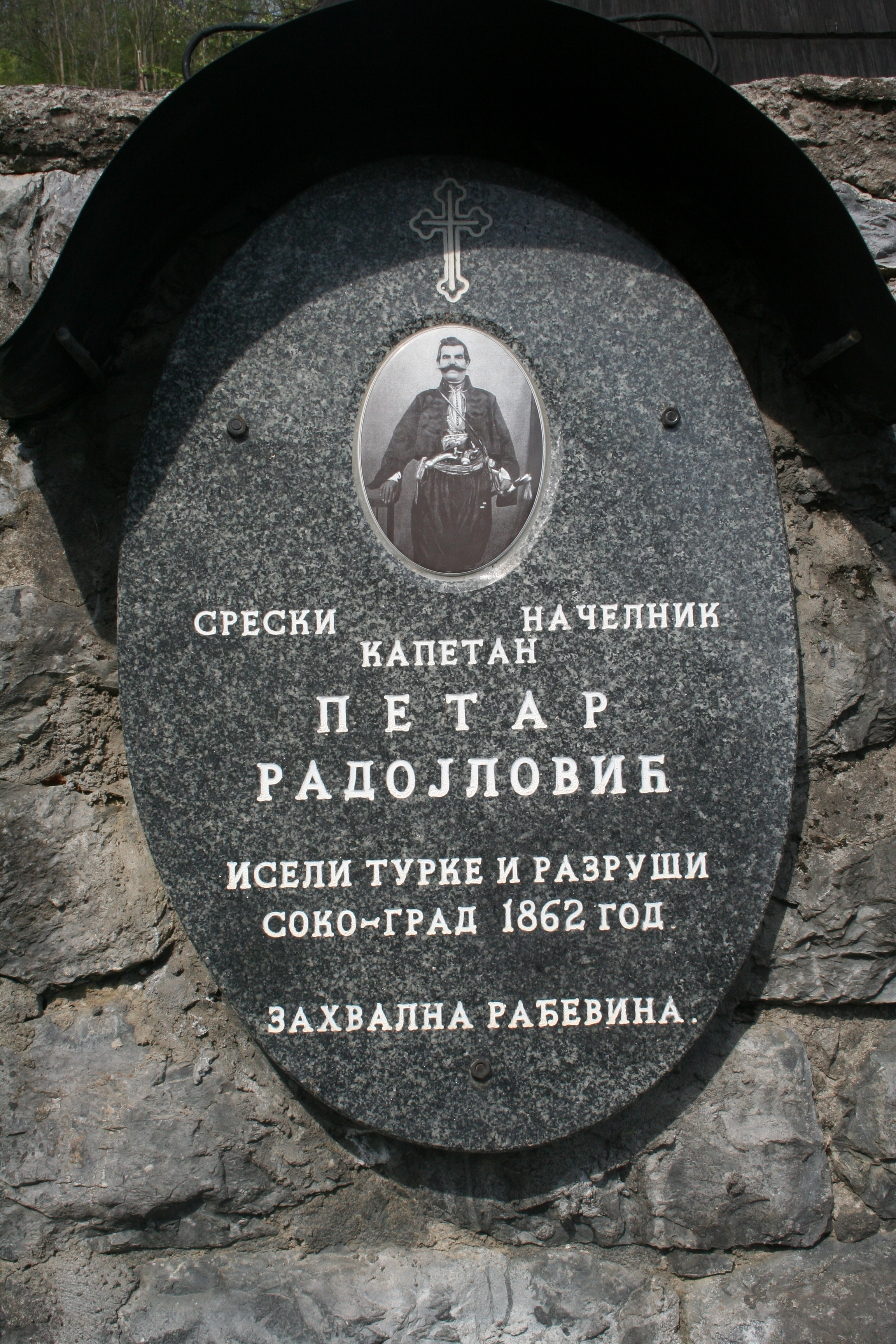 Crkva Uspenja Presvete Bogorodice, Dobri potok Krupanj